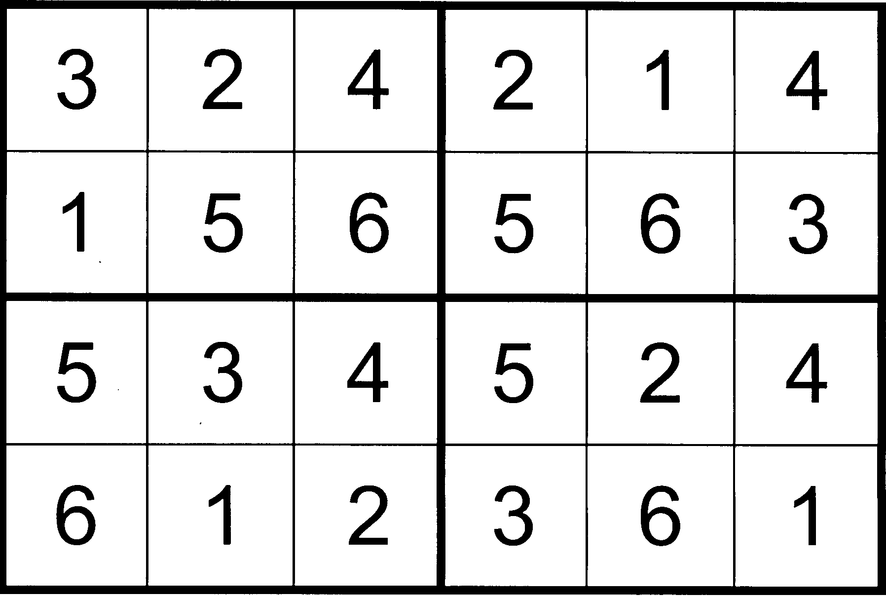 PDABAC